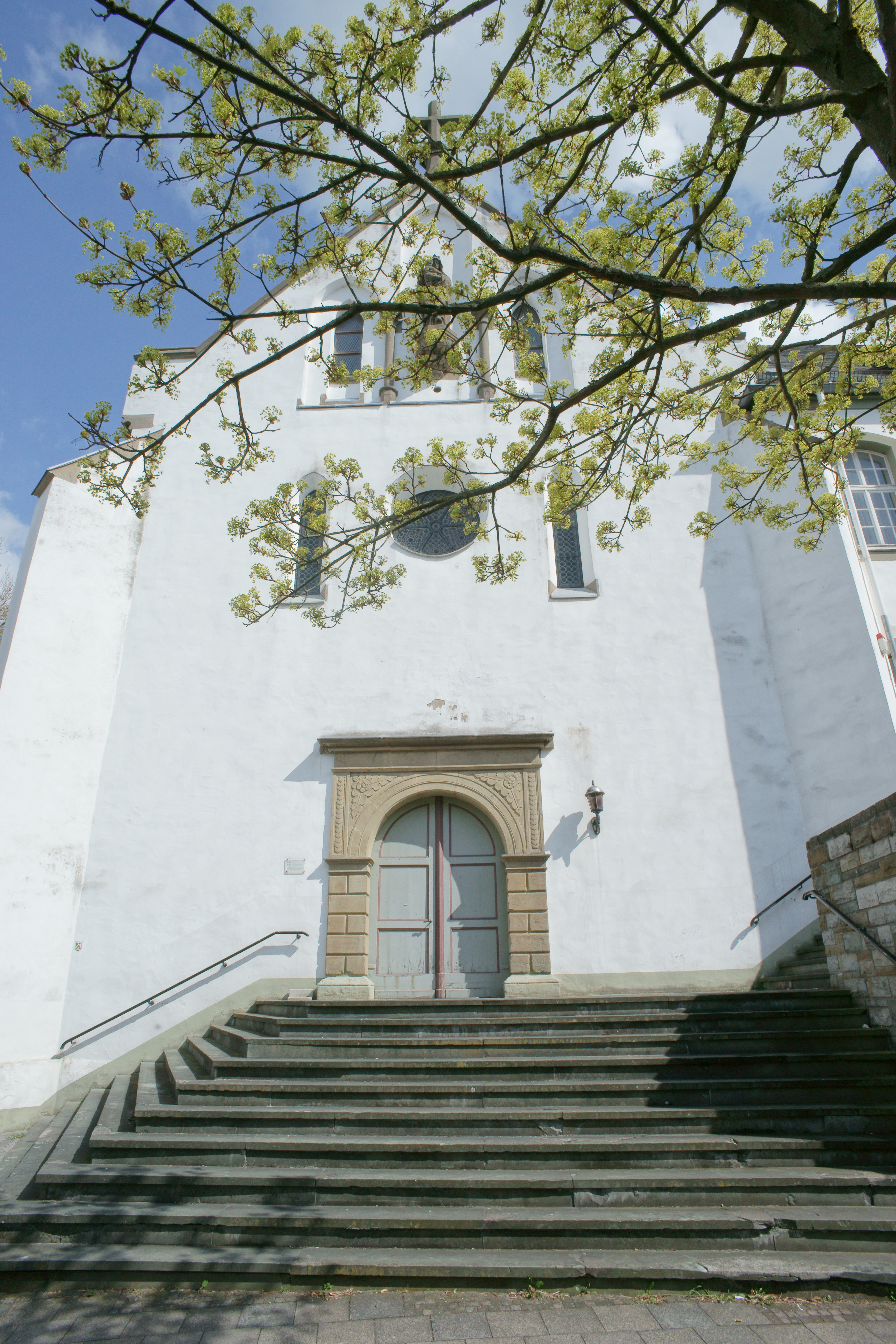 Ehemaliges Franziskanerkloster Geseke